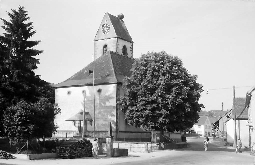 Hauingen: Kirche mit Storchennest